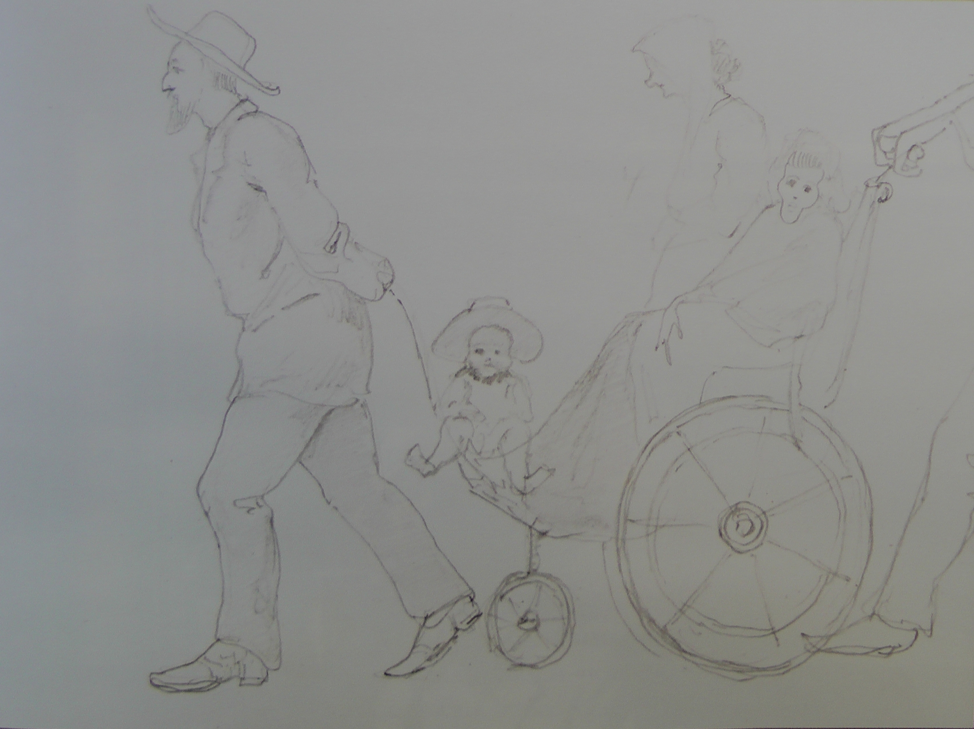 Дружеский шарж на семью Чертковых. Бумага, картон, графический карандаш, 20 х 23 см, 1890. Музей-усадьба Н. А. Ярошенко в Пятигорске